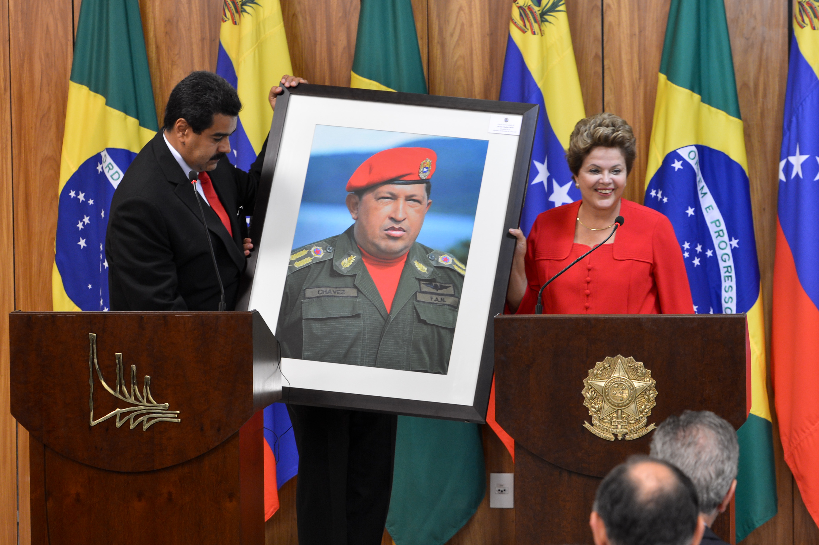 A presidenta Dilma Rousseff recebe do presidente da Venezuela, Nicolás Maduro, um quadro do ex-presidente Hugo Chávez.